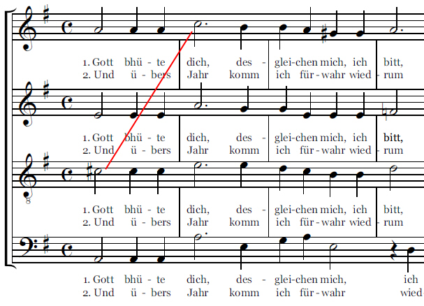 Л. Лехнер. Песня Gott, bhüte dich (фрагмент, иллюстрирующий переченье).